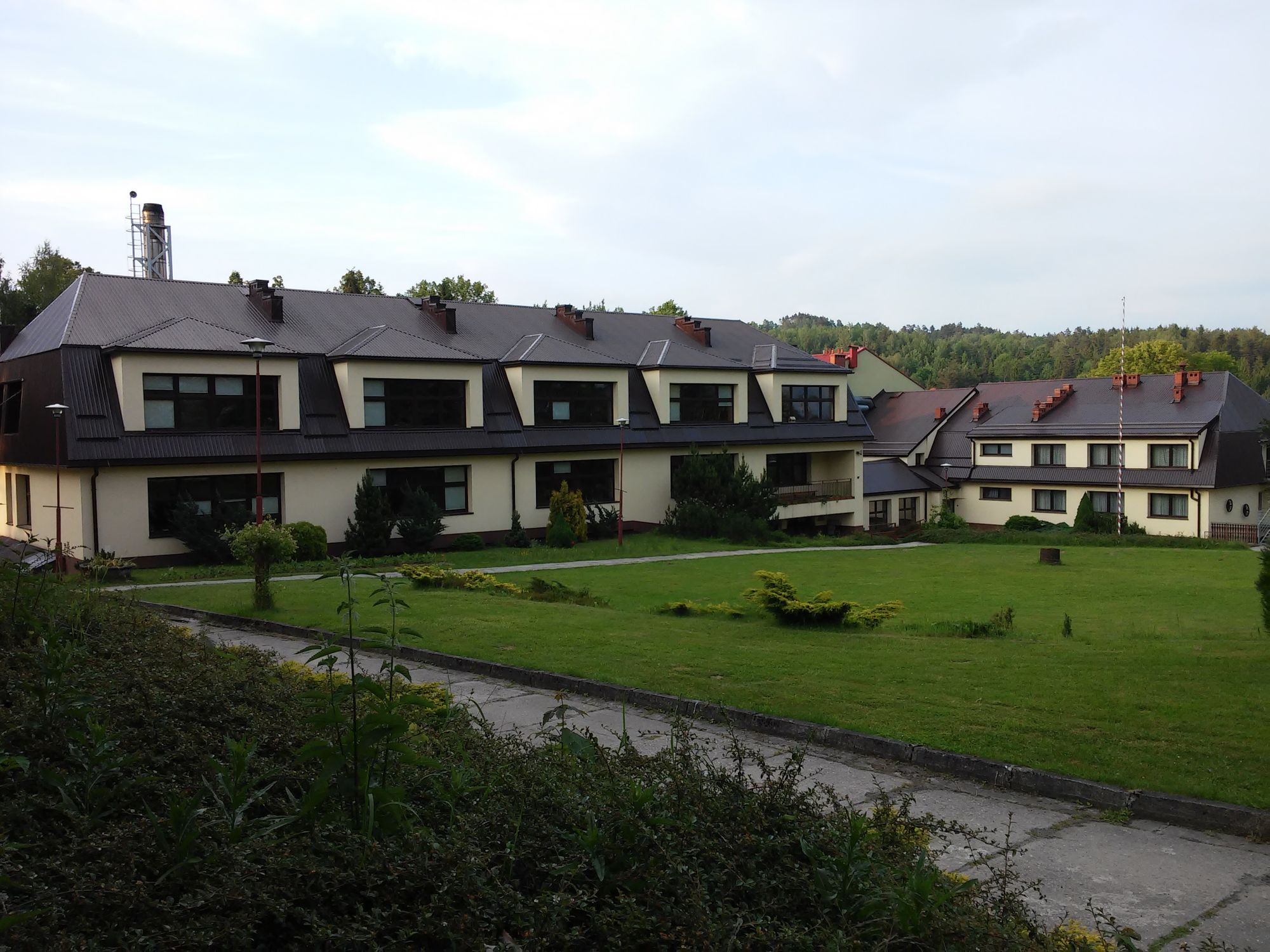 Zespół Szkół im. bł. ks. Piotra Dańkowskiego - główny budynek